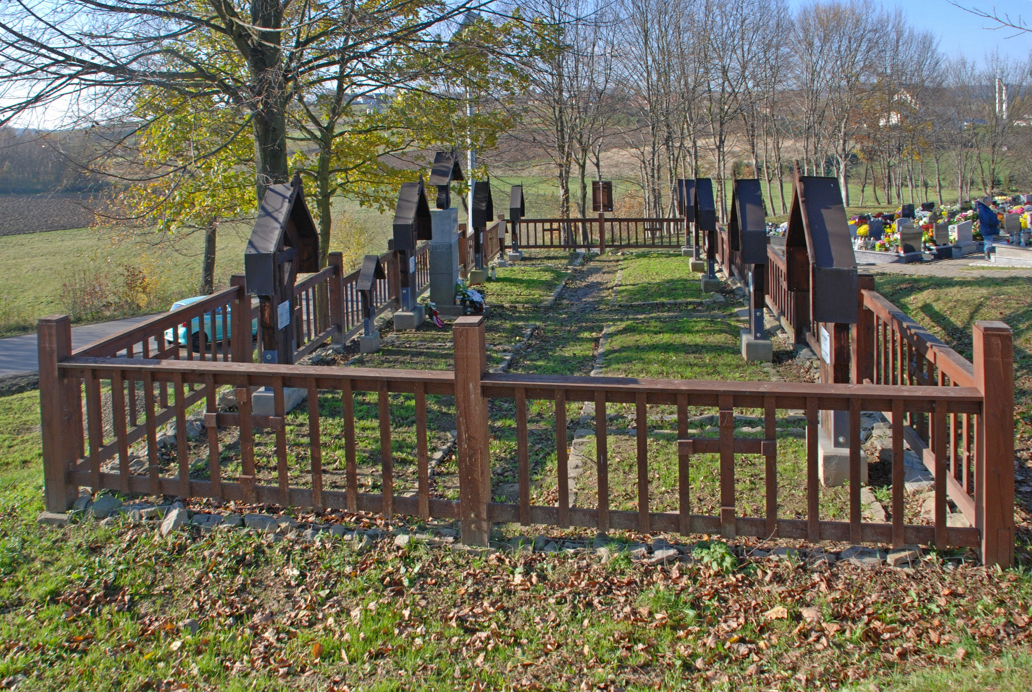 wieś Sieklówka